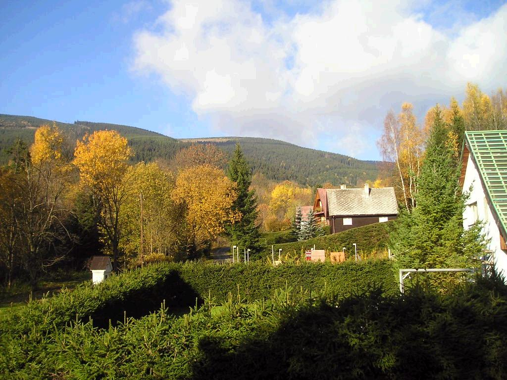 Podzimem vybarvený pohled na Hynčice pod Sušinou